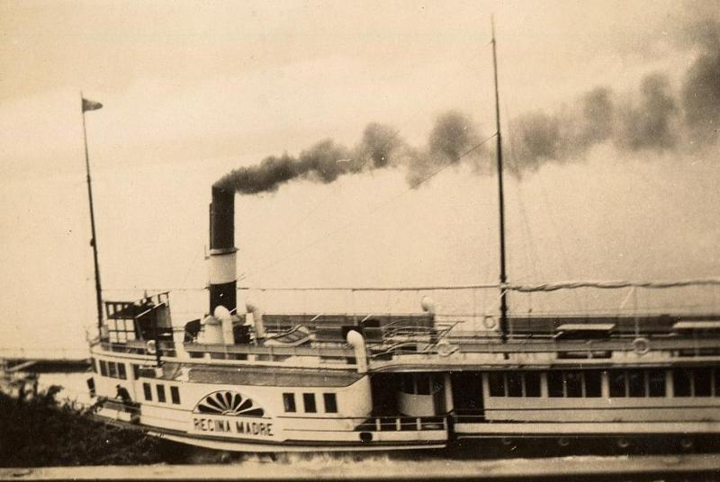 Foto d'epoca del Piroscafo Pieomonte Ex Regina Madre